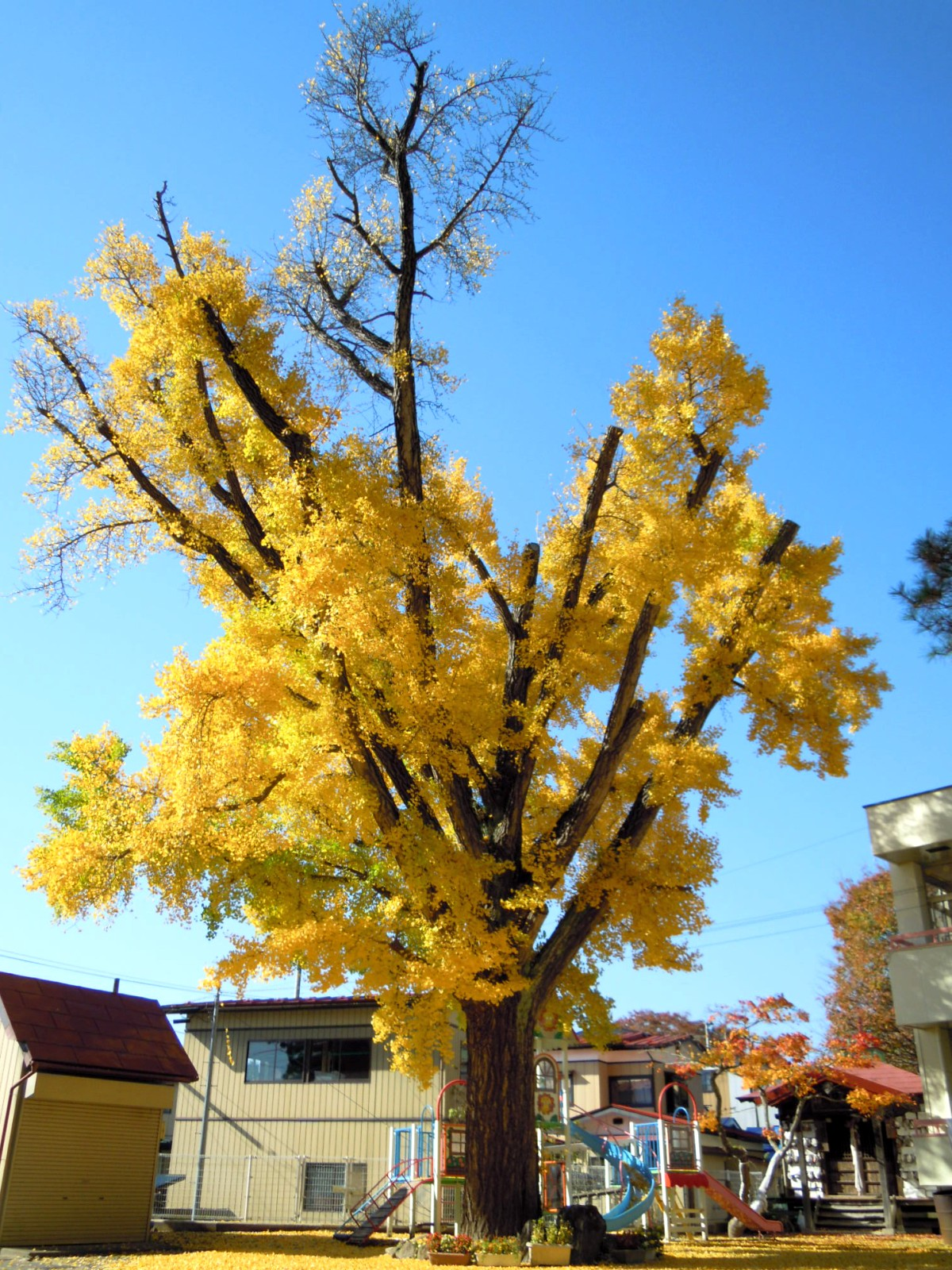 岩手県二戸郡一戸町にある実相寺のイチョウ。国の天然記念物